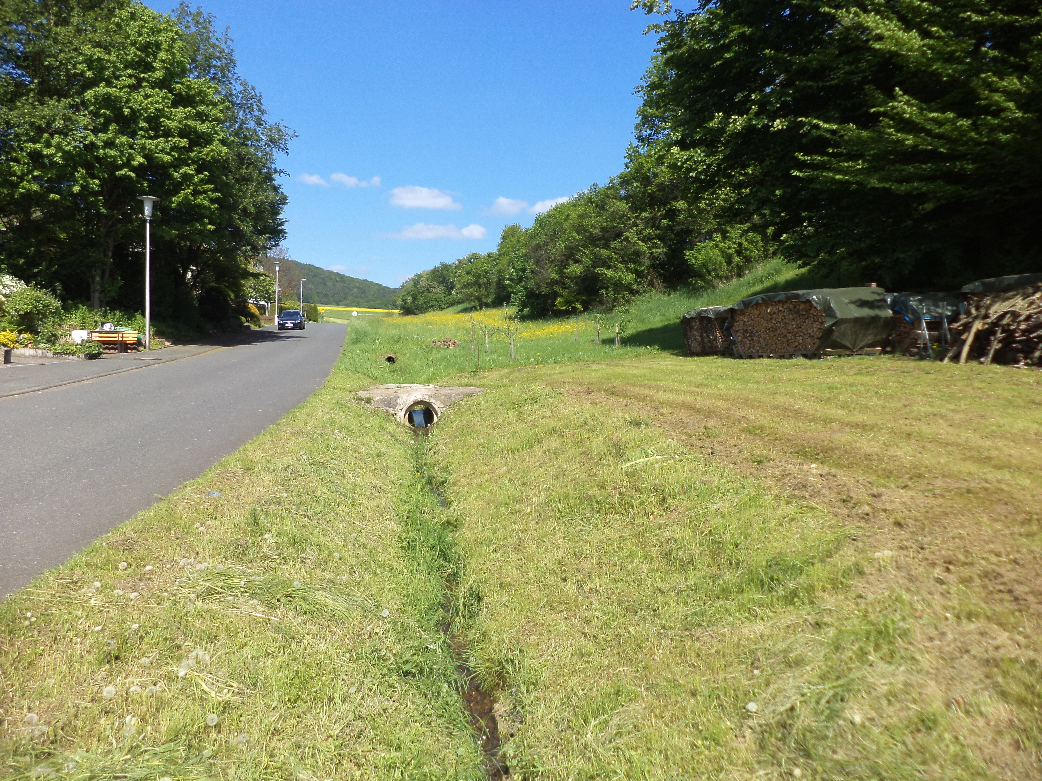 Der Schulzengrundbach in Oberwestern